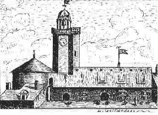 Prison du Bouffay gravure du 18e siècle